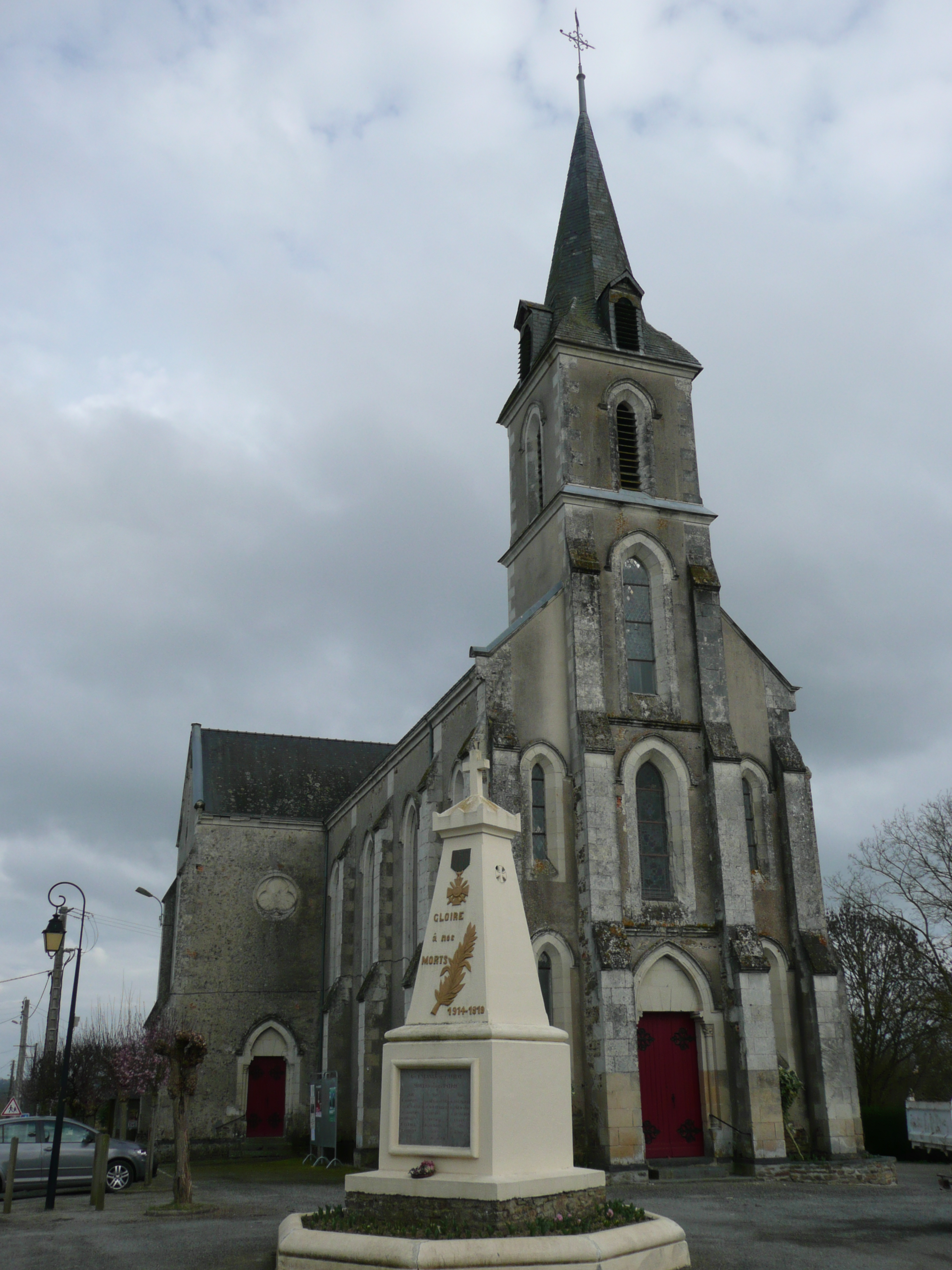 Eglise de Carbay